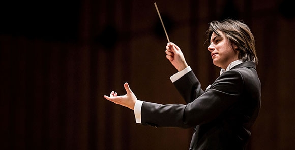 Conductor